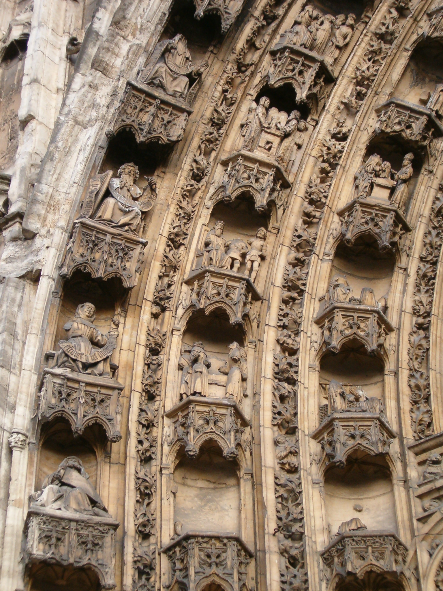 Détail du tympan du portail de la Cathédrale de Vienne. Janvier 2007.